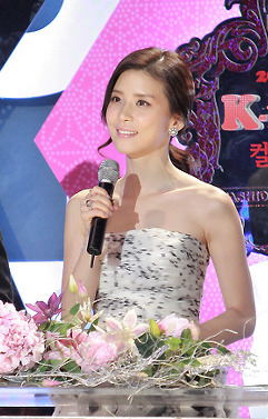 아나운서 최기환과 배우 이보영